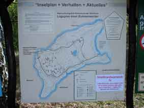 Plan der Insel Buhnenwerder auf dem Naturlehrpfad